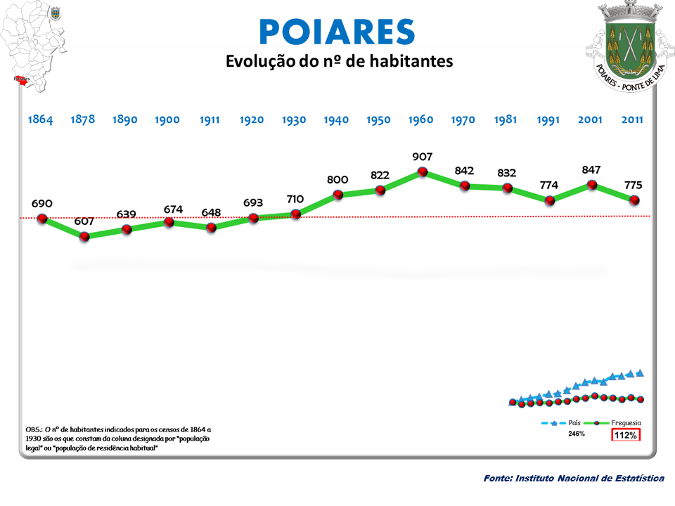 Cenos 1864/2011